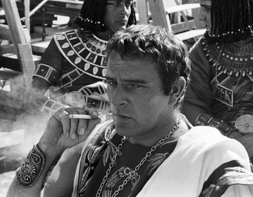 Richard Burton in una pausa del film "Cleopatra"